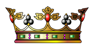 Margrave's coronet